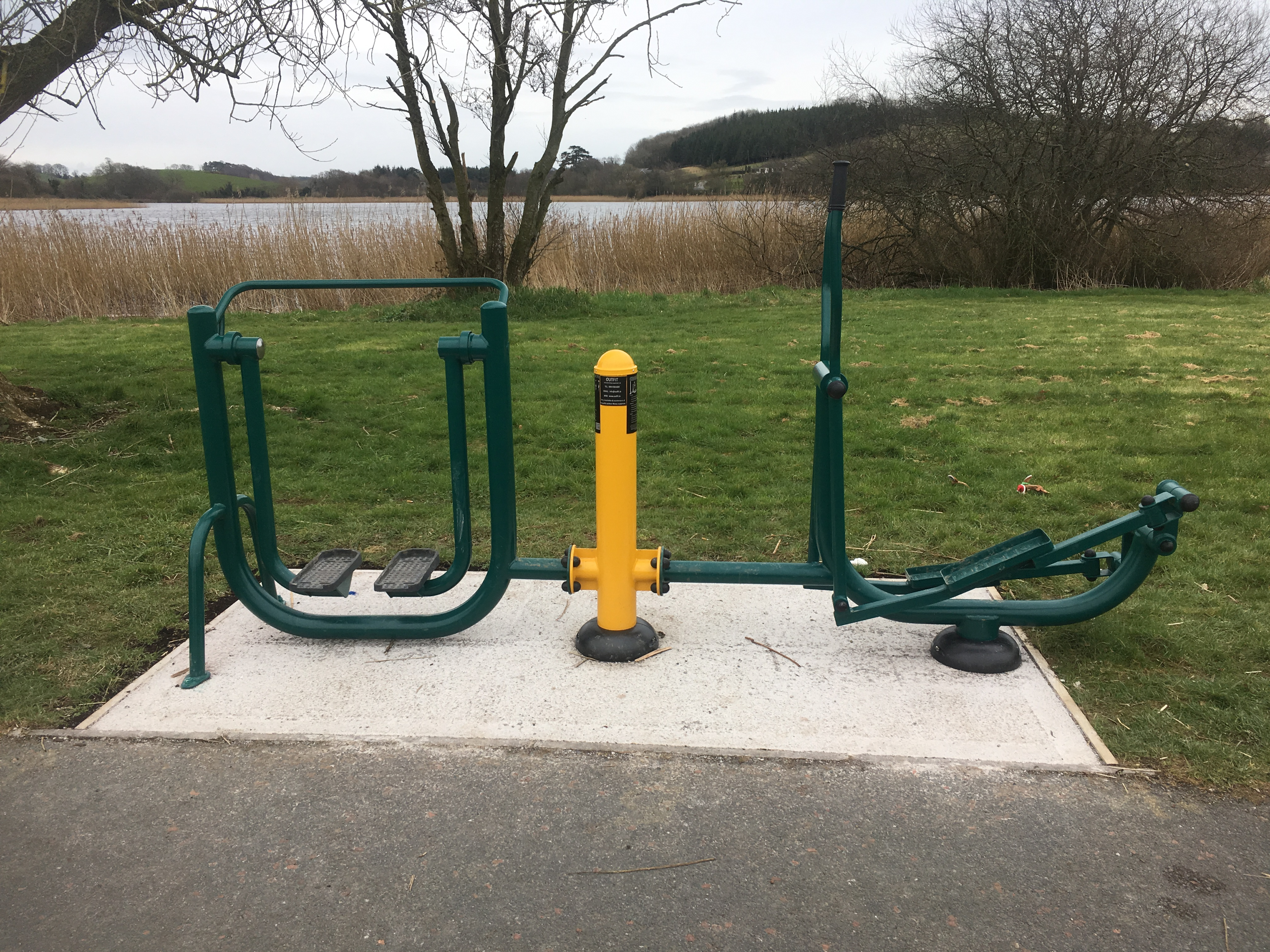 Tá sé suite timpeall na páirce.